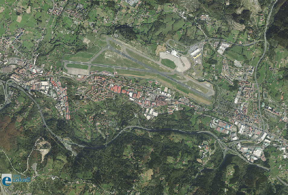 Bilboko aireportuaren ortoargazkia